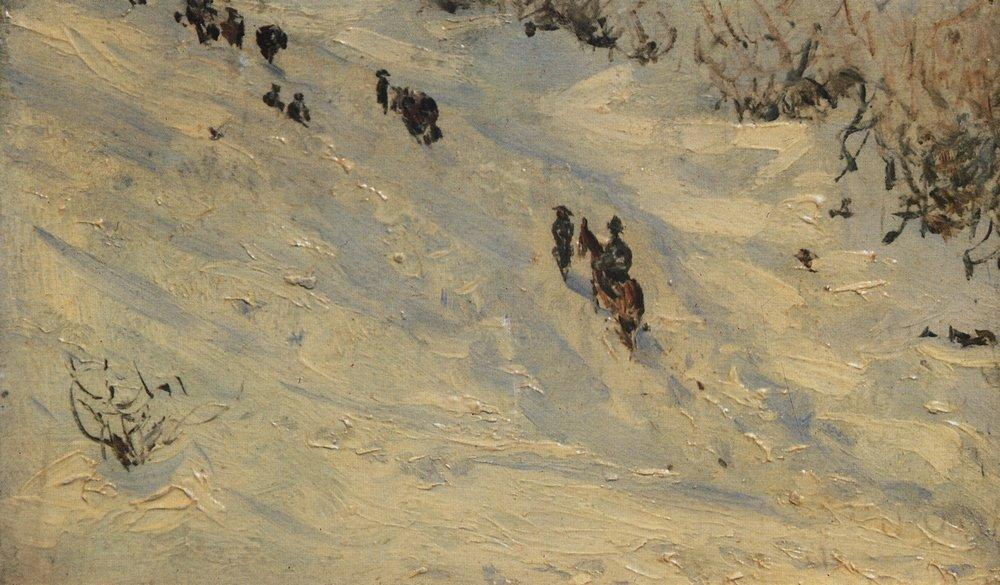 Переход колонны М.Д.Скобелева через Балканы